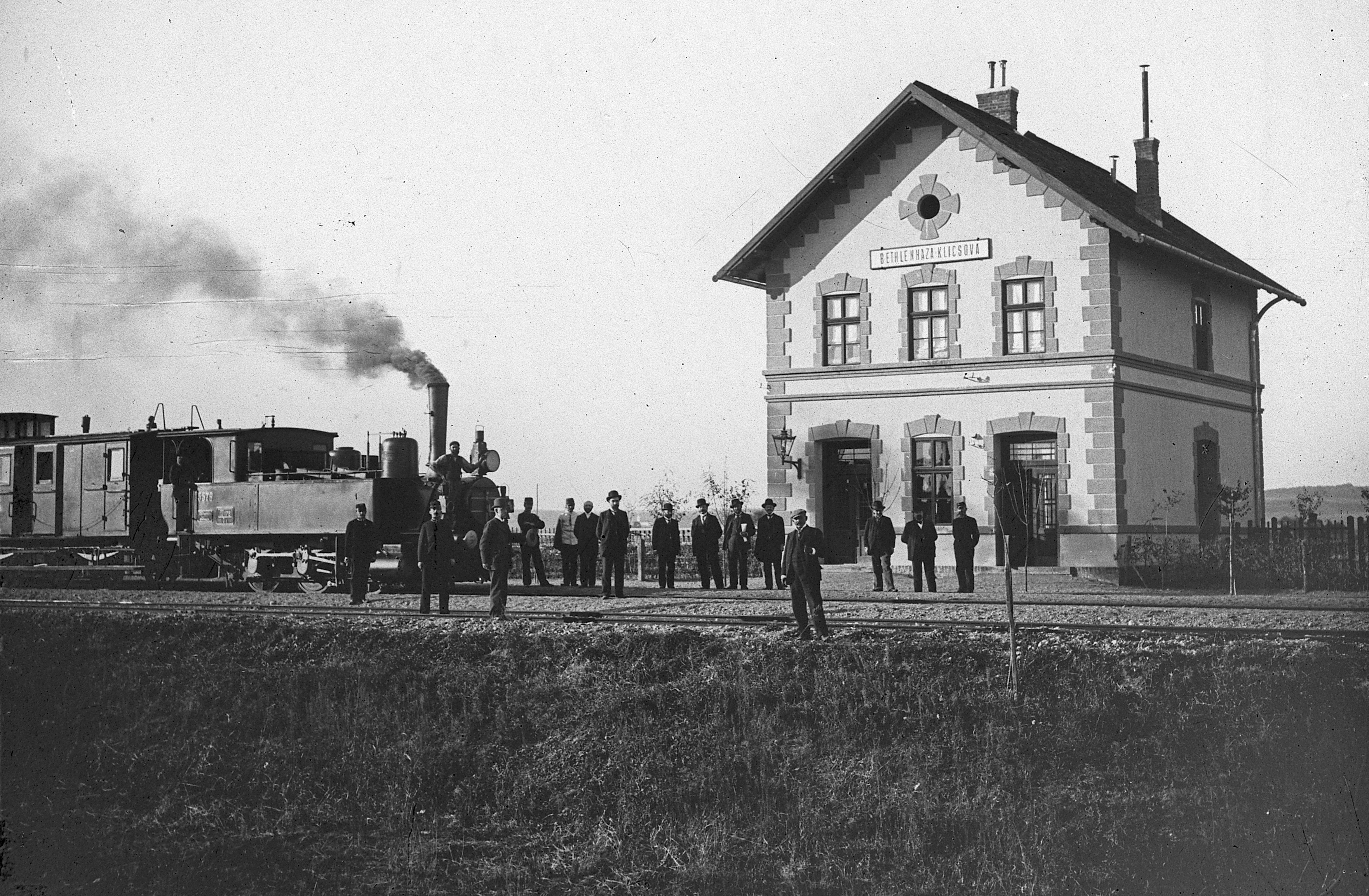 vasútállomás a Bánságban. Location: Romania, Transylvania, Bethausen, Cliciova Tags: steam locomotive, Hungarian Railways, railway, train station Title: vasútállomás a Bánságban.